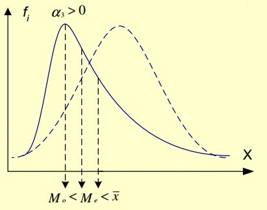 Графички приказ за Позитивно асиметричен распоред